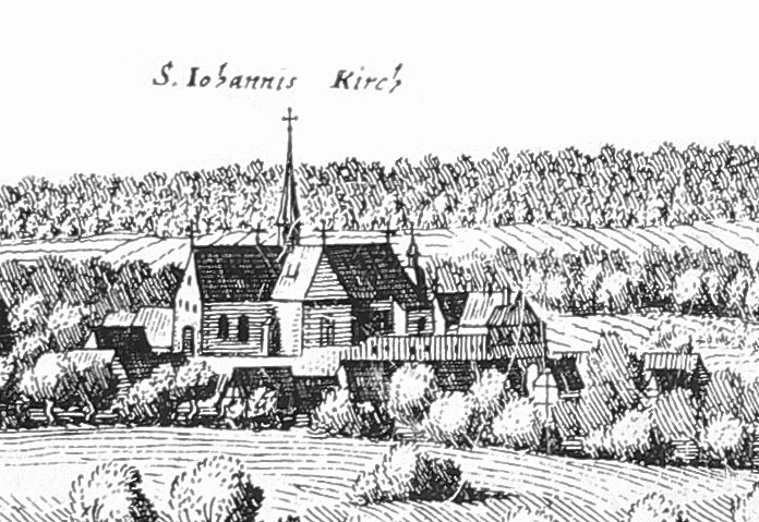 Süpplingenburg als Merian Kupferstich von 1654 (Ausschnitt)